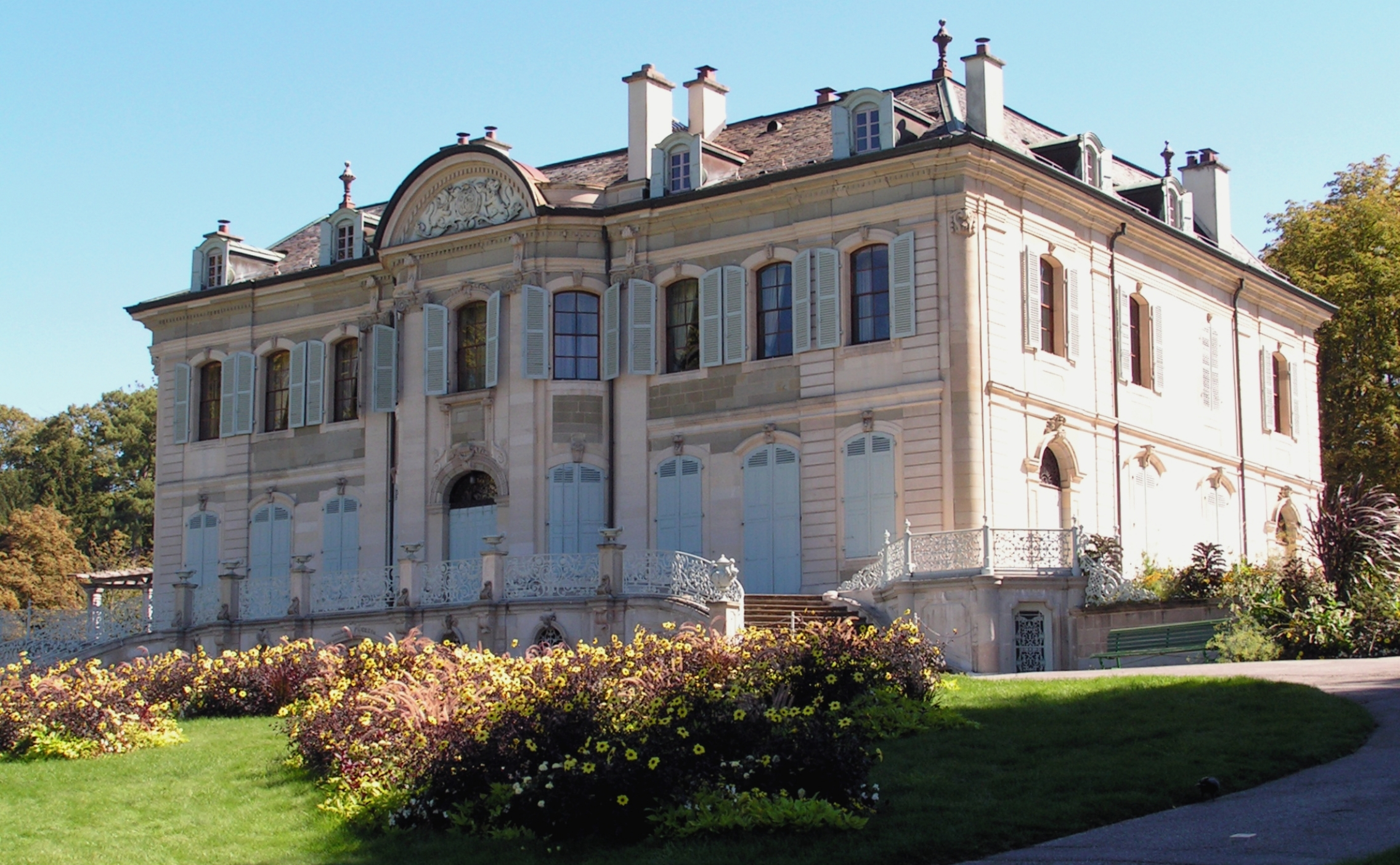 Genève. Parc et campagne de la Grange avec bibliothèque ; habitat littoral néolithique / villa romaine. La villa du XVIIIe siècle.